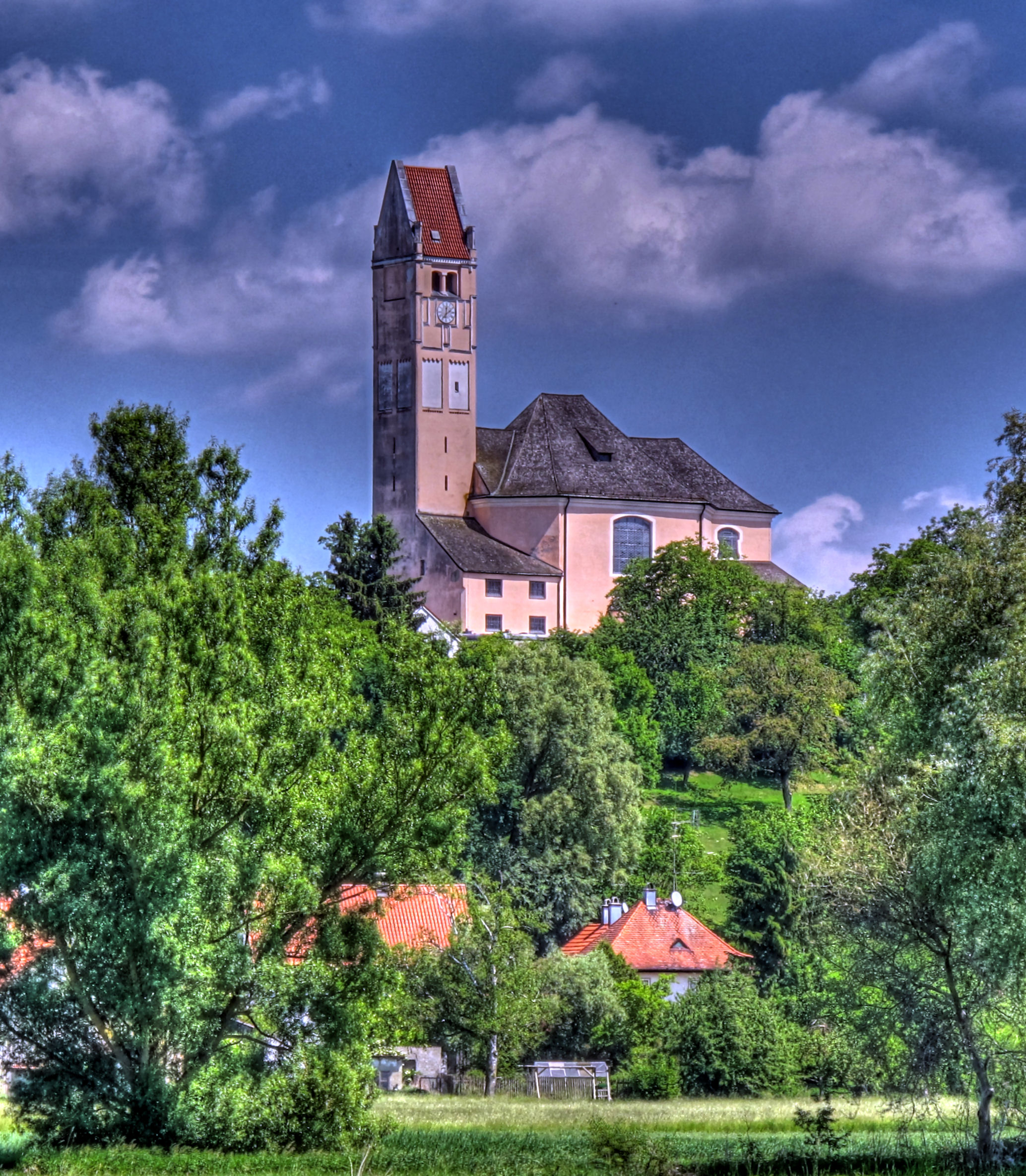 Deutschland, Bayern, Landkreis, Dachau, Gemeinde Bergkirchen, Pfarrkirche St. Johannes Baptist, HDR-Image